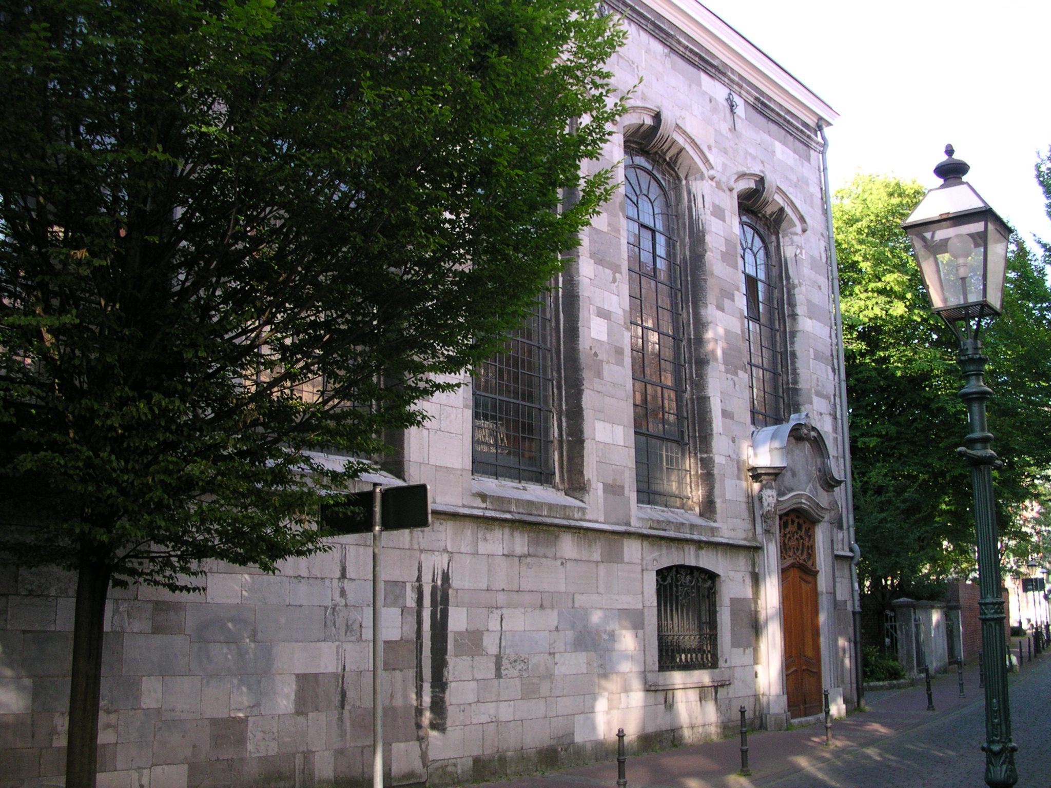 Aachen, evangelische Annakirche in der Annastraße